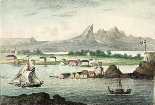 Bodø på 1800-tallet. Illustrasjon hentet fra boken "Norsk Prospect-Samling" av Wergmann, P.F. og utgitt av P.F. Wergmann (no, 1833-1836).